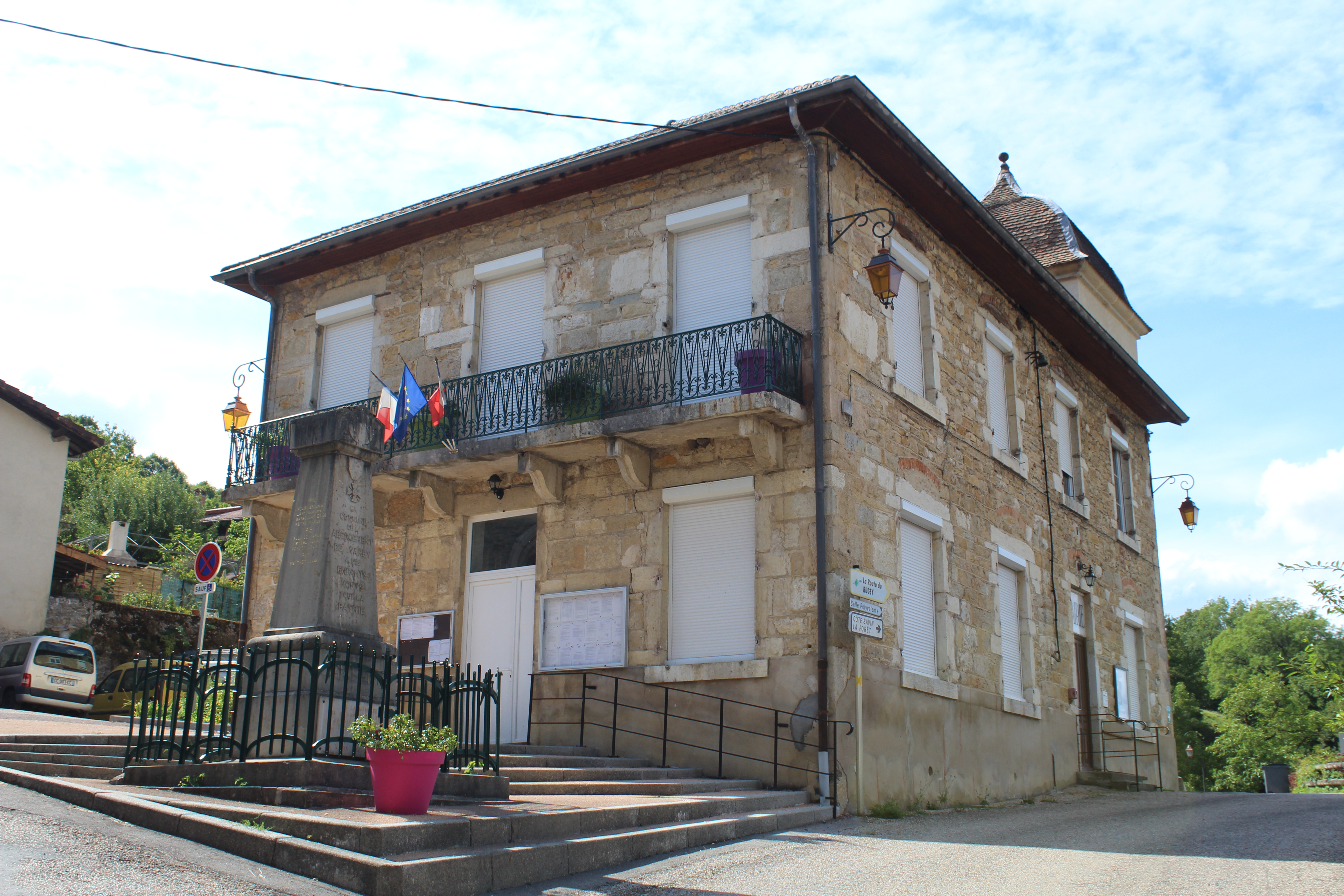 Mairie de L'Abergement-de-Varey.